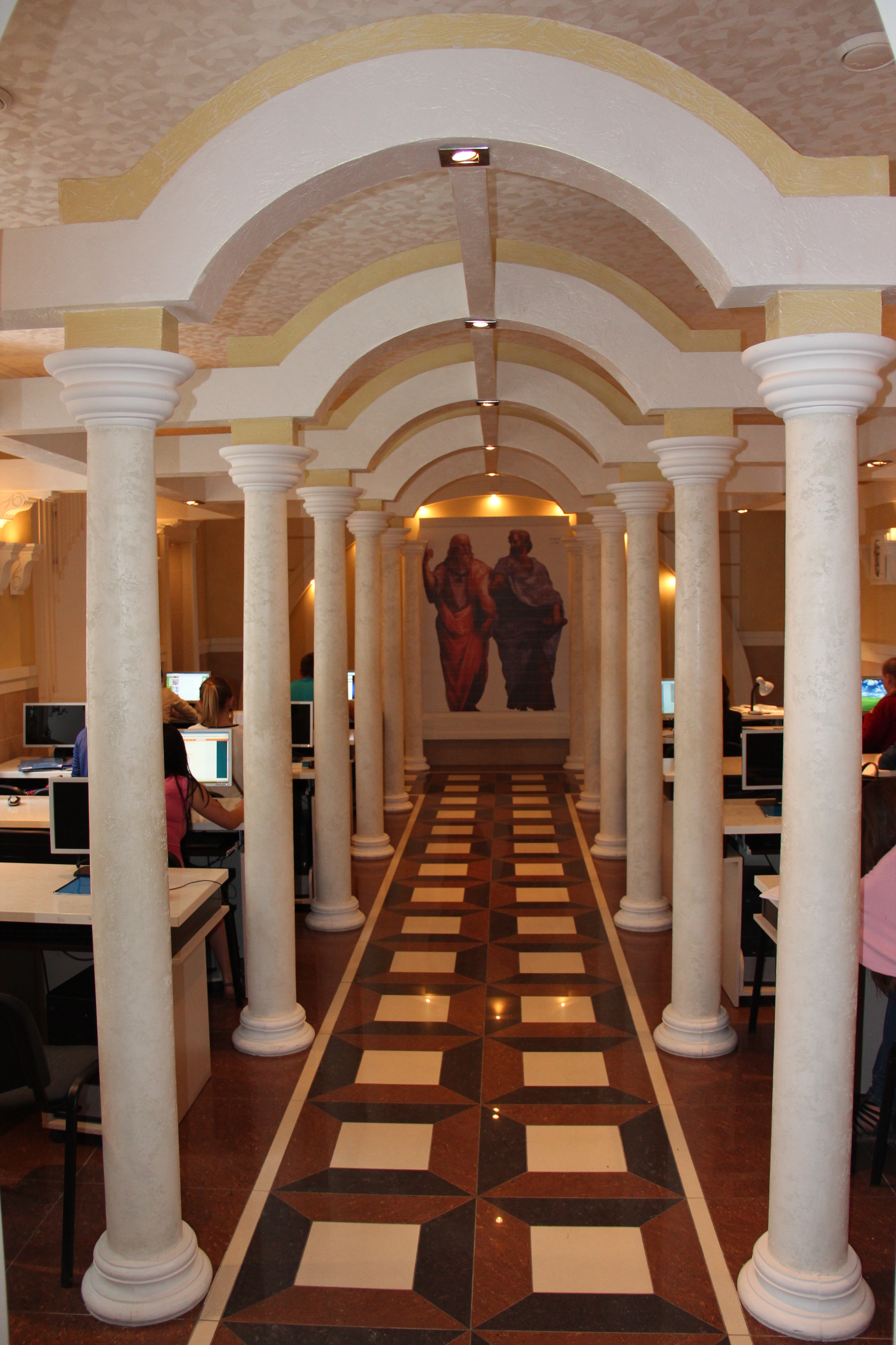 Експозиція античної зали бібліотеки ХКТЕІ - 2013 рік.